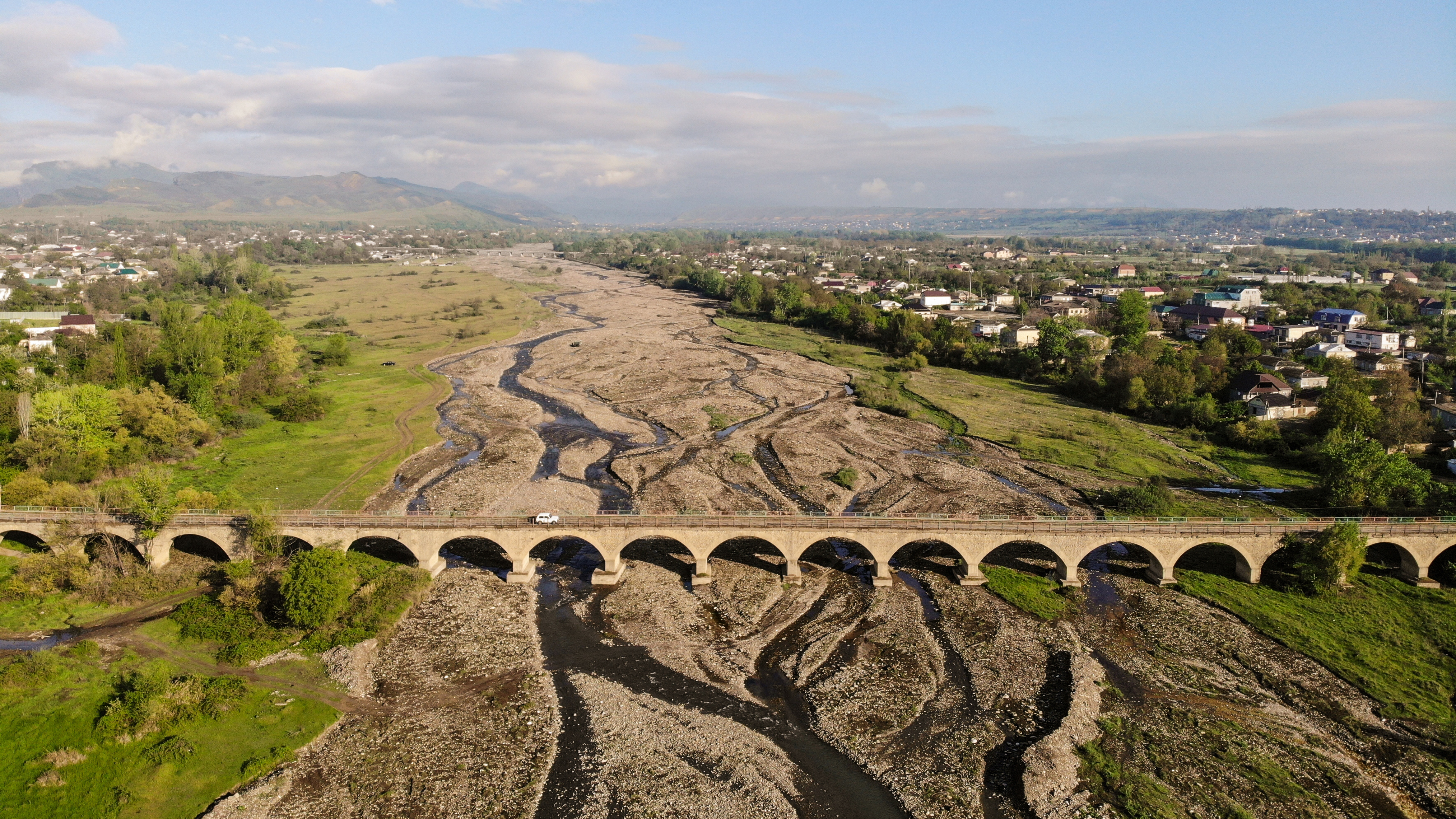 Касумкент